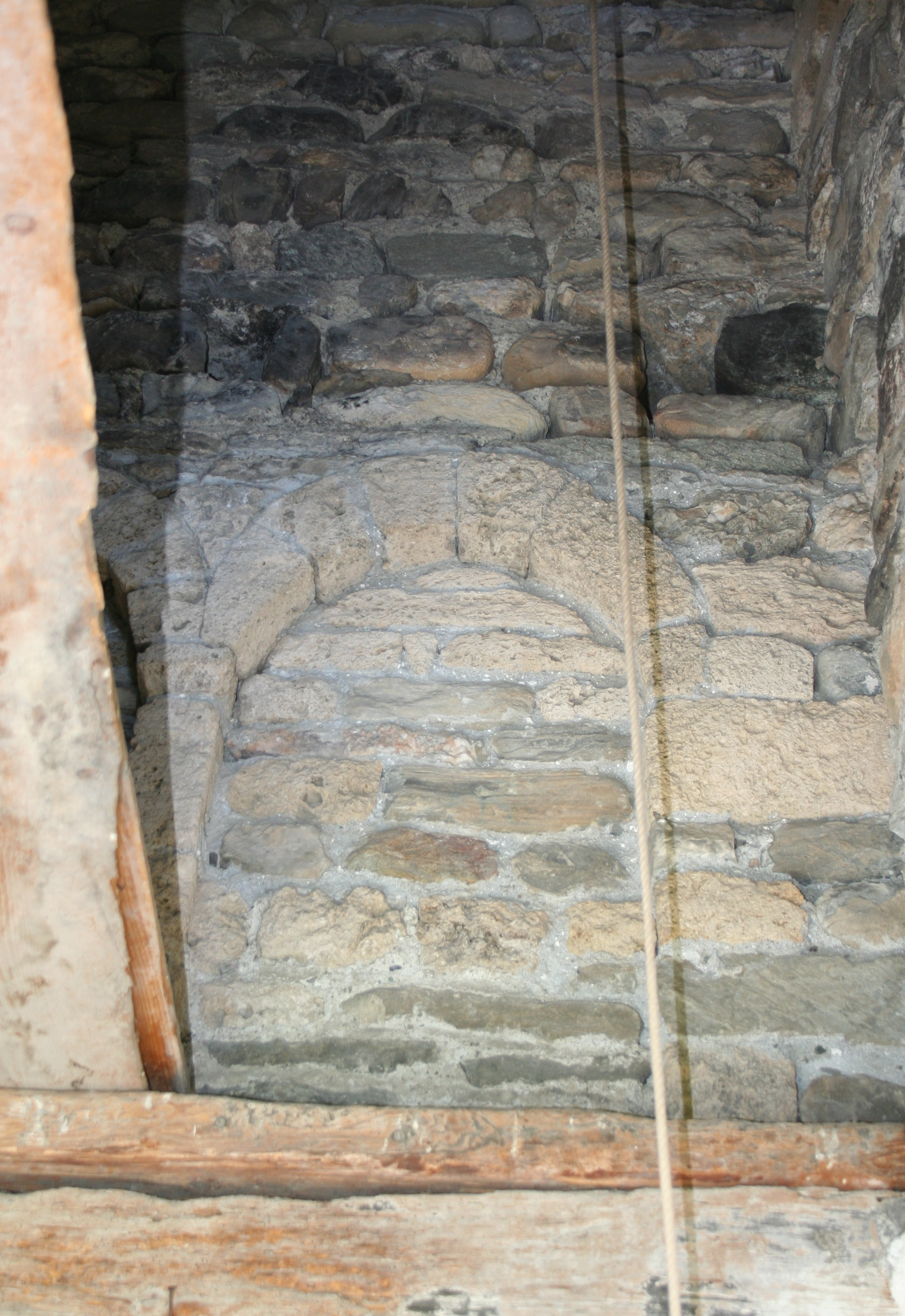 Scheinarkaden in der Kapelle St. Lorenz (Paspels)